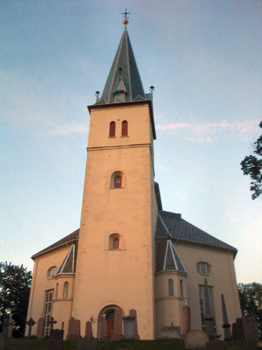 Vang kirke, front.